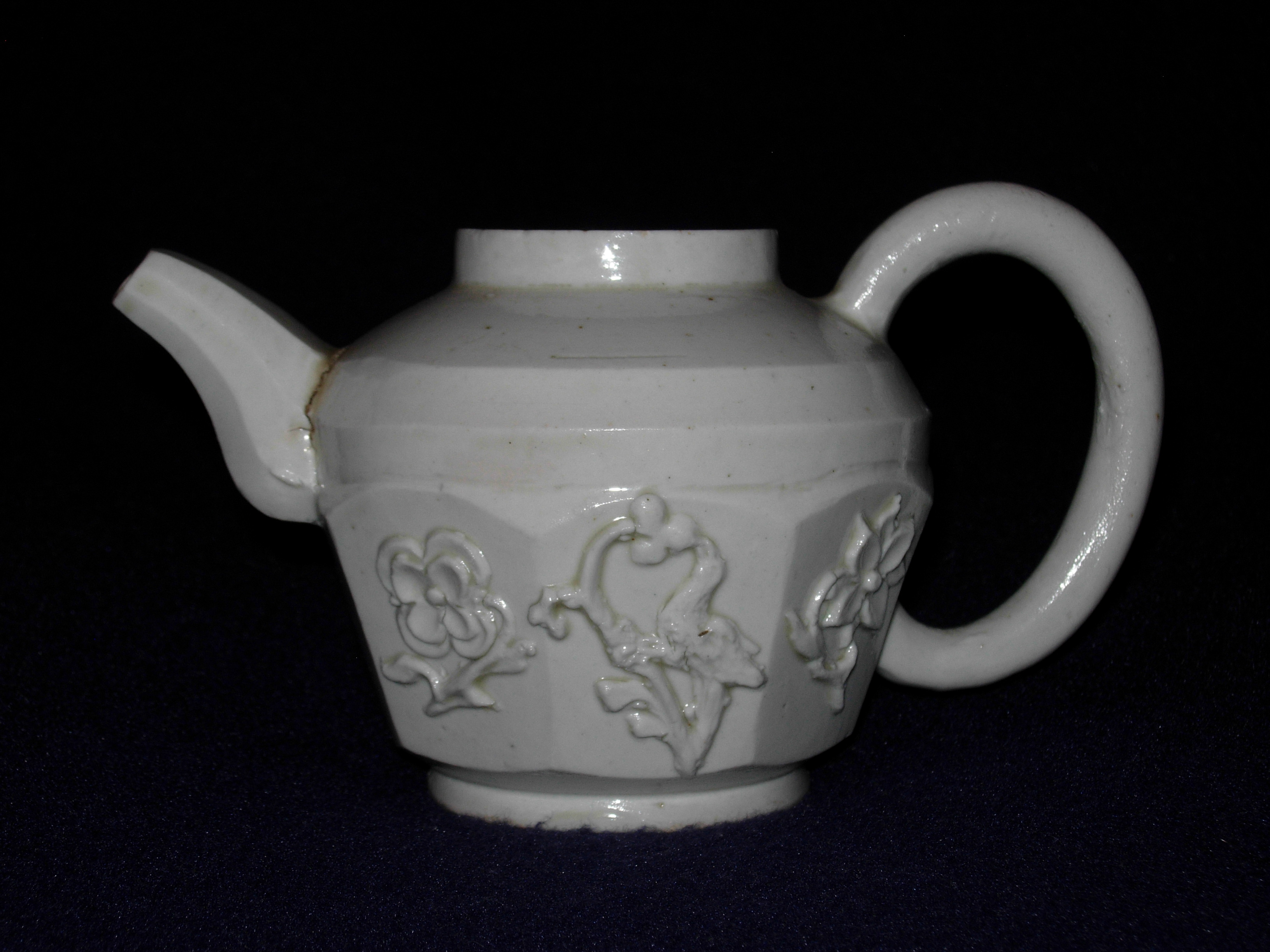 Teiera ottagonale della Manifattura Vezzi (1720/27) - Venezia - pubblicata in "Rari inediti della fabbrica Vezzi" - pag. 61-64 - n° 2 Faenza - 2012